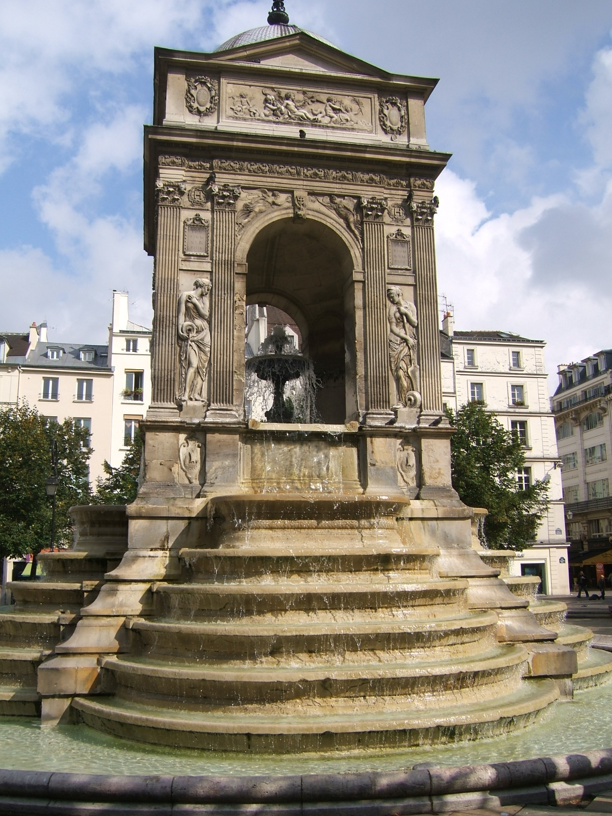 Fontaine des Innocents (Paris, France)